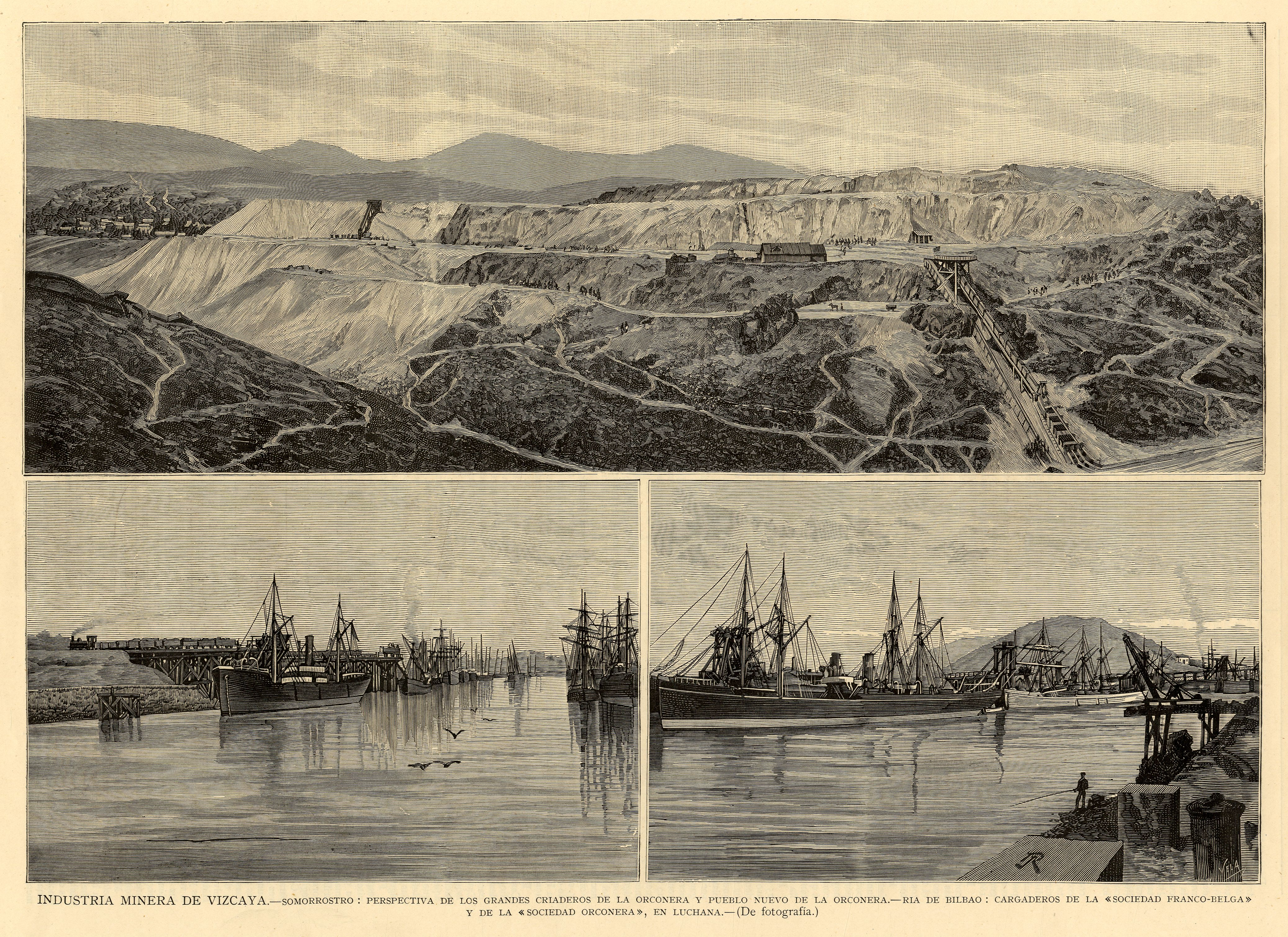 Somorrostro, perspectiva de los grandes criaderos de la Orconera y pueblo nuevo de la Orconera (imagen de 125 x 338 mm) -- [2]: Ría de Bilbao : cargaderos de la "Sociedad franco-belga", en Luchana (imagen de 110 x 167 mm) -- [3]: Ría de Bilbao, cargaderos de la "Sociedad Orconera", en Luchana (imagen de 110 x 167 mm)